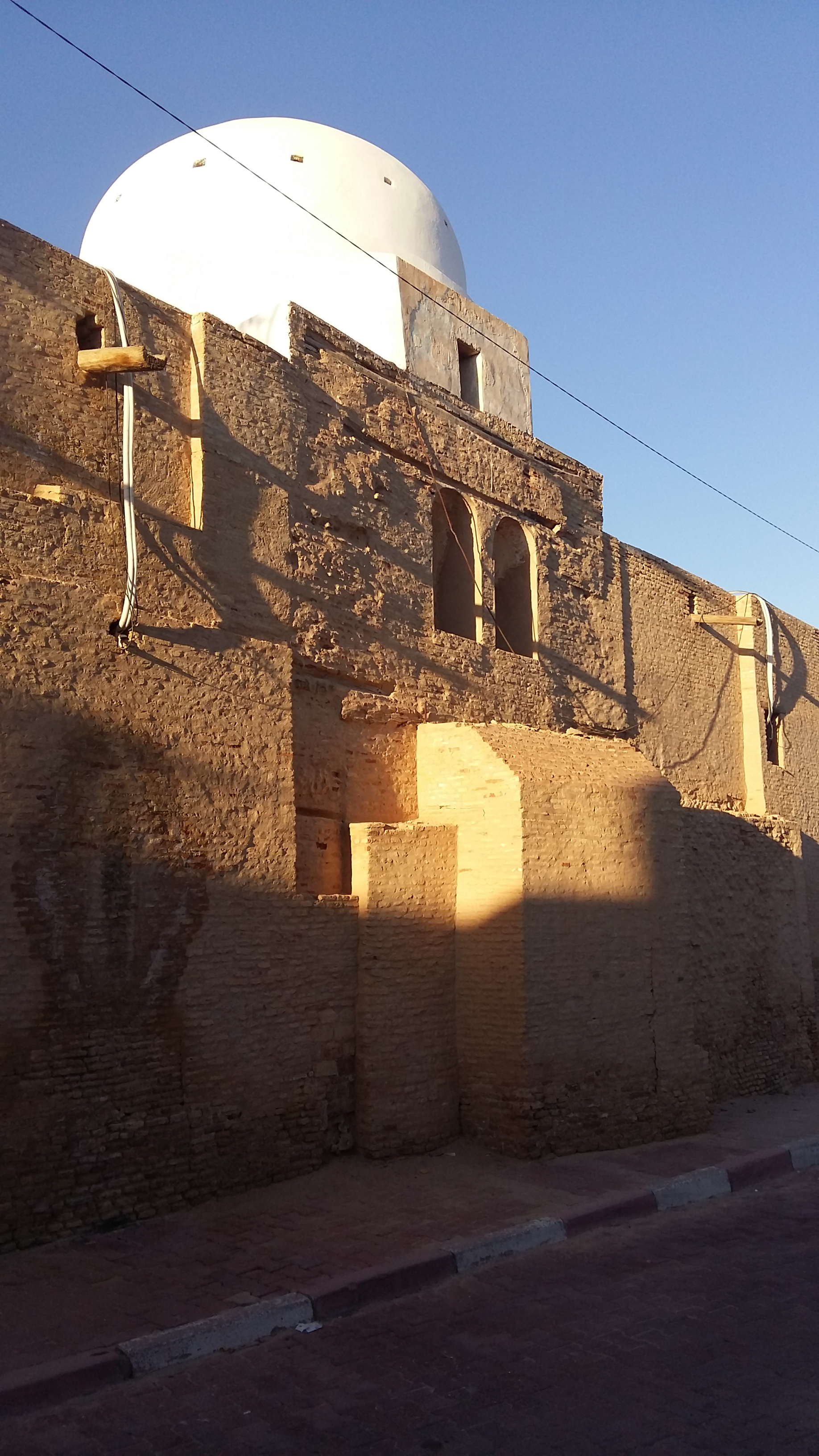 Mosquée de Bled-el-Hadher, près de Tozeur